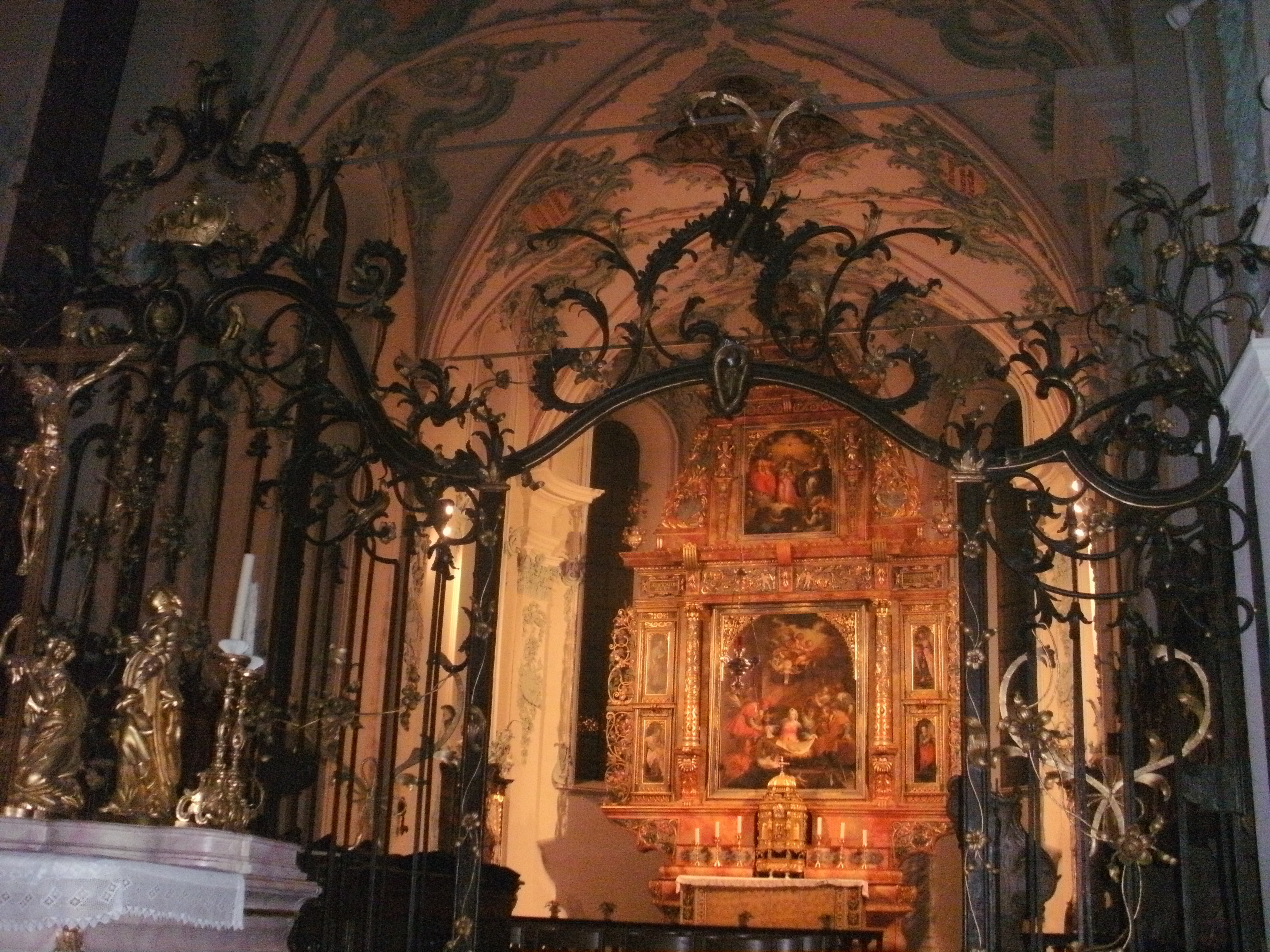 Chorraum der Stadtkirche St. Martin in Rheinfelden